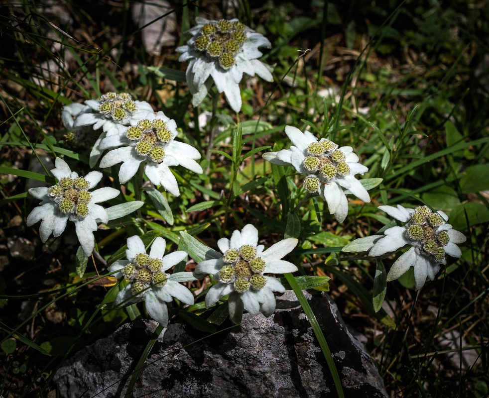 Slowenien, Julische Alpen: Botanischer Garten Alpinum Juliana in Trenta: Leontopodium alpinum